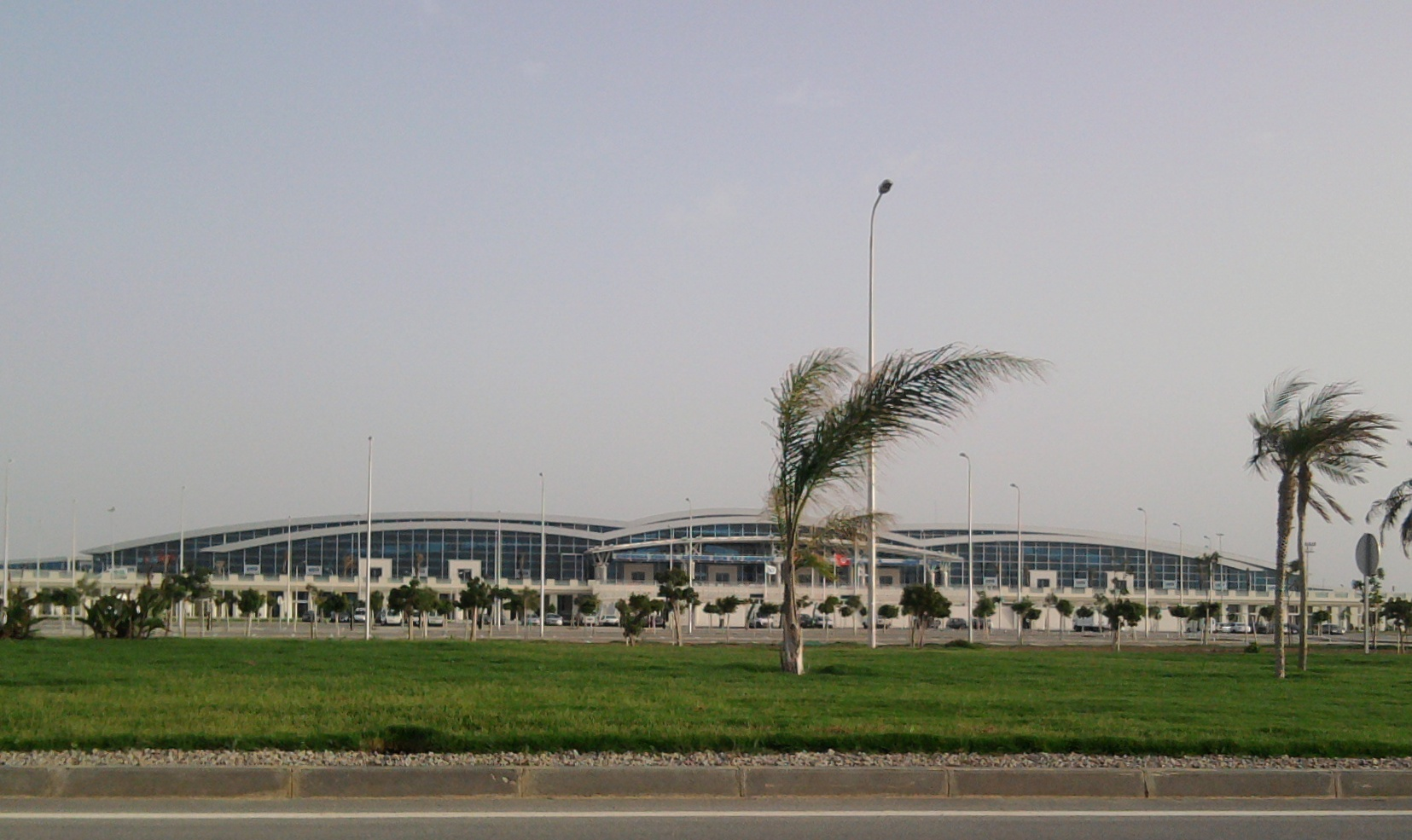 Tunisie, Aéroport international Enfidha